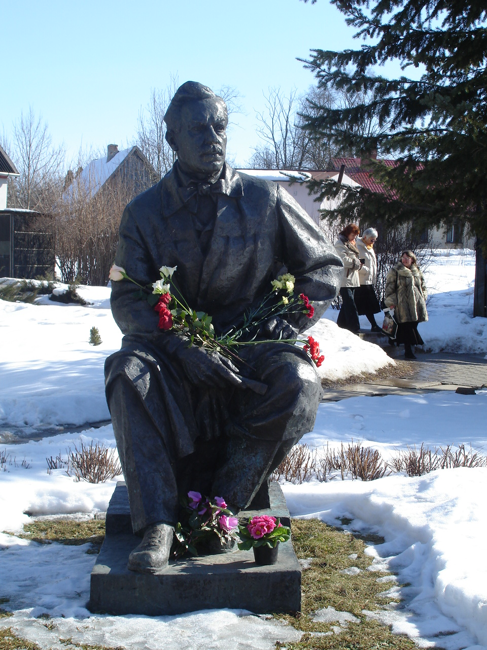 Statue in Saldus